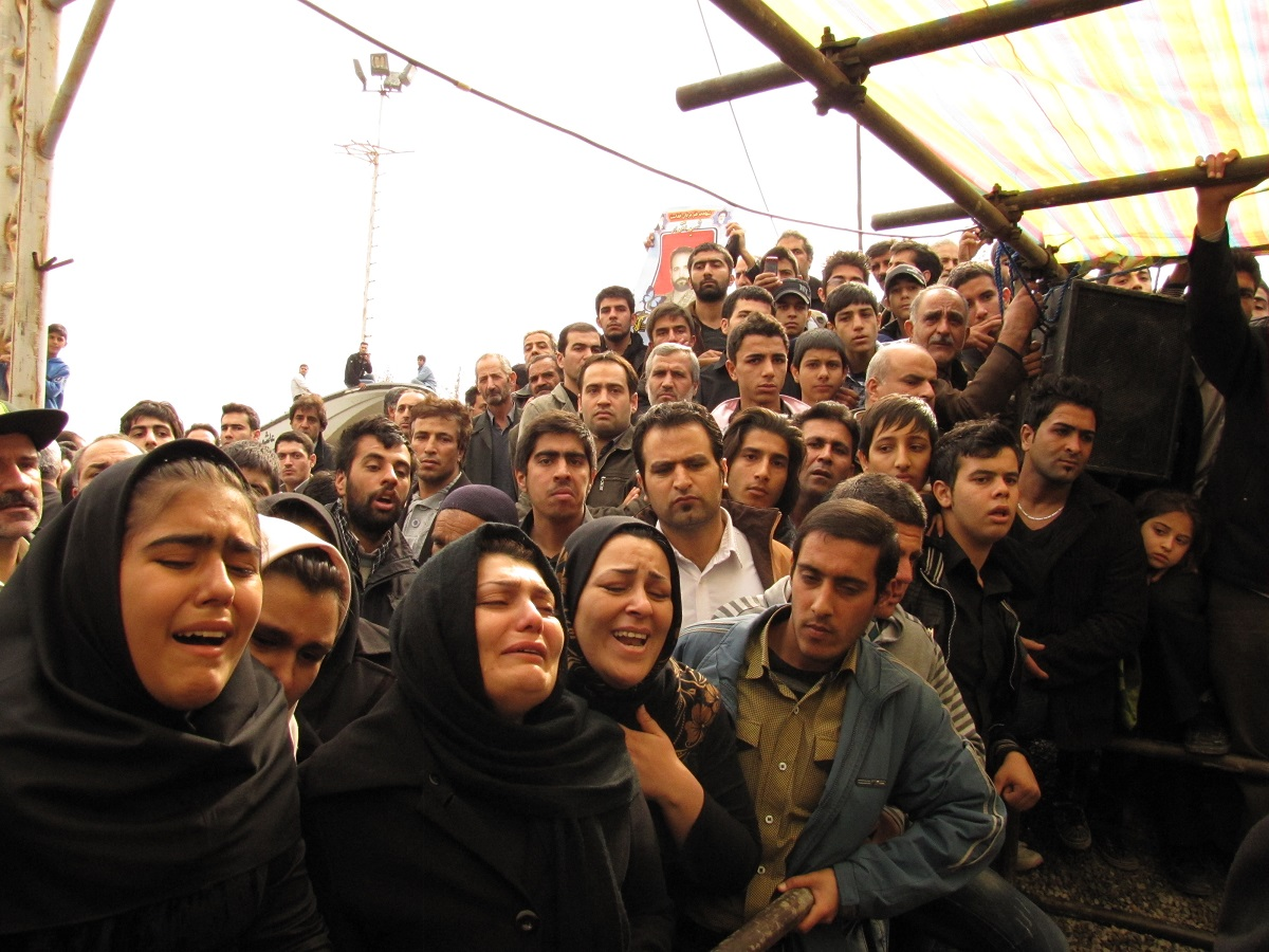 Shahid eghtedar malard تشییع شهدای اقتدار ملارد